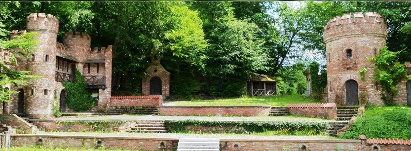 Die Bühne des Hofbergfreilichttheaters in Schiltberg